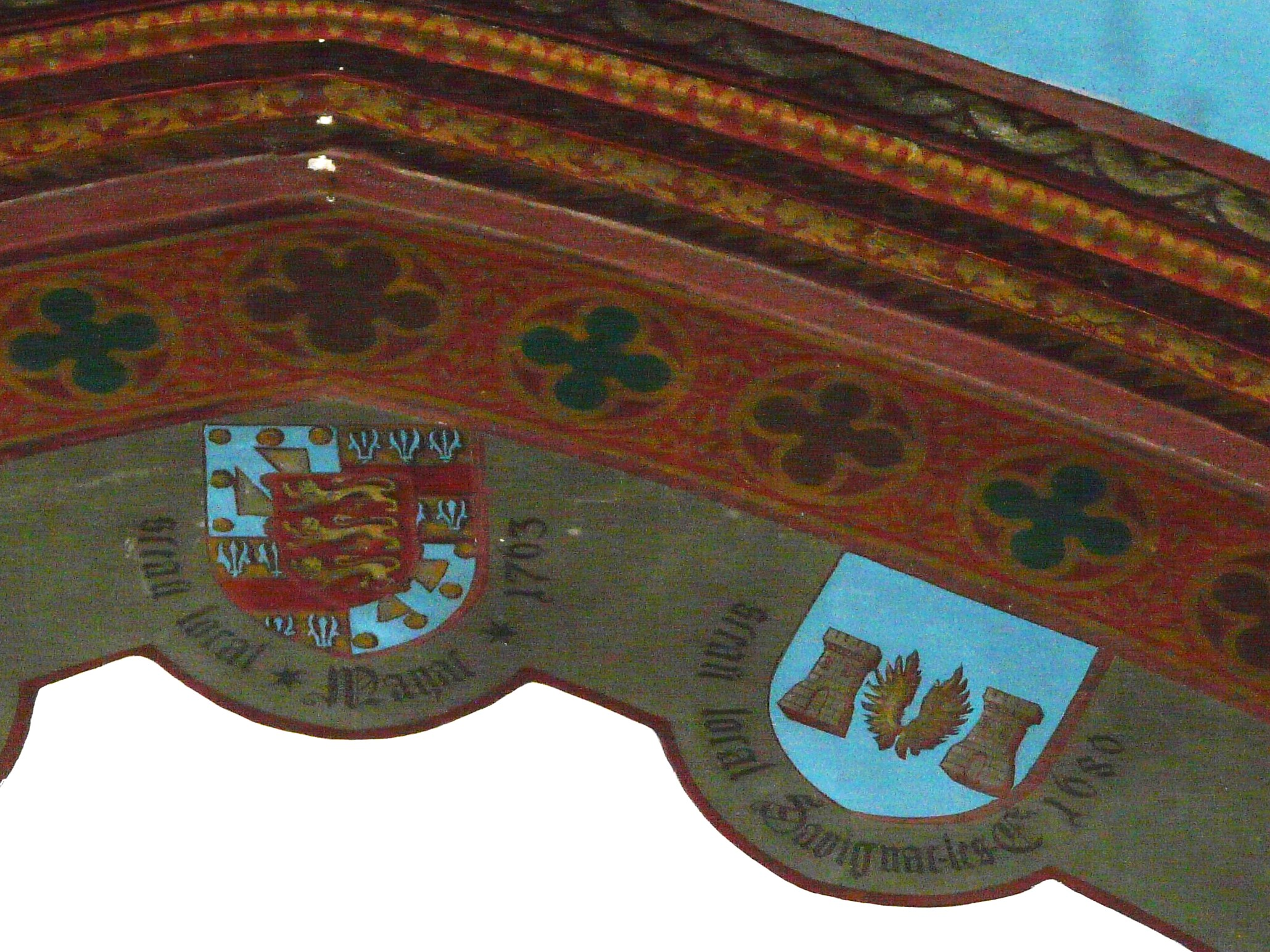 Peinture du chœur de l'église Saint-Martin, Savignac-les-Églises, Dordogne, France. Représentation du sceau local de Mayac (à gauche en 1763) et de celui de Savignac-les-Églises (à droite en 1680) ; le blason de droite est celui de la famille du Chaylard.